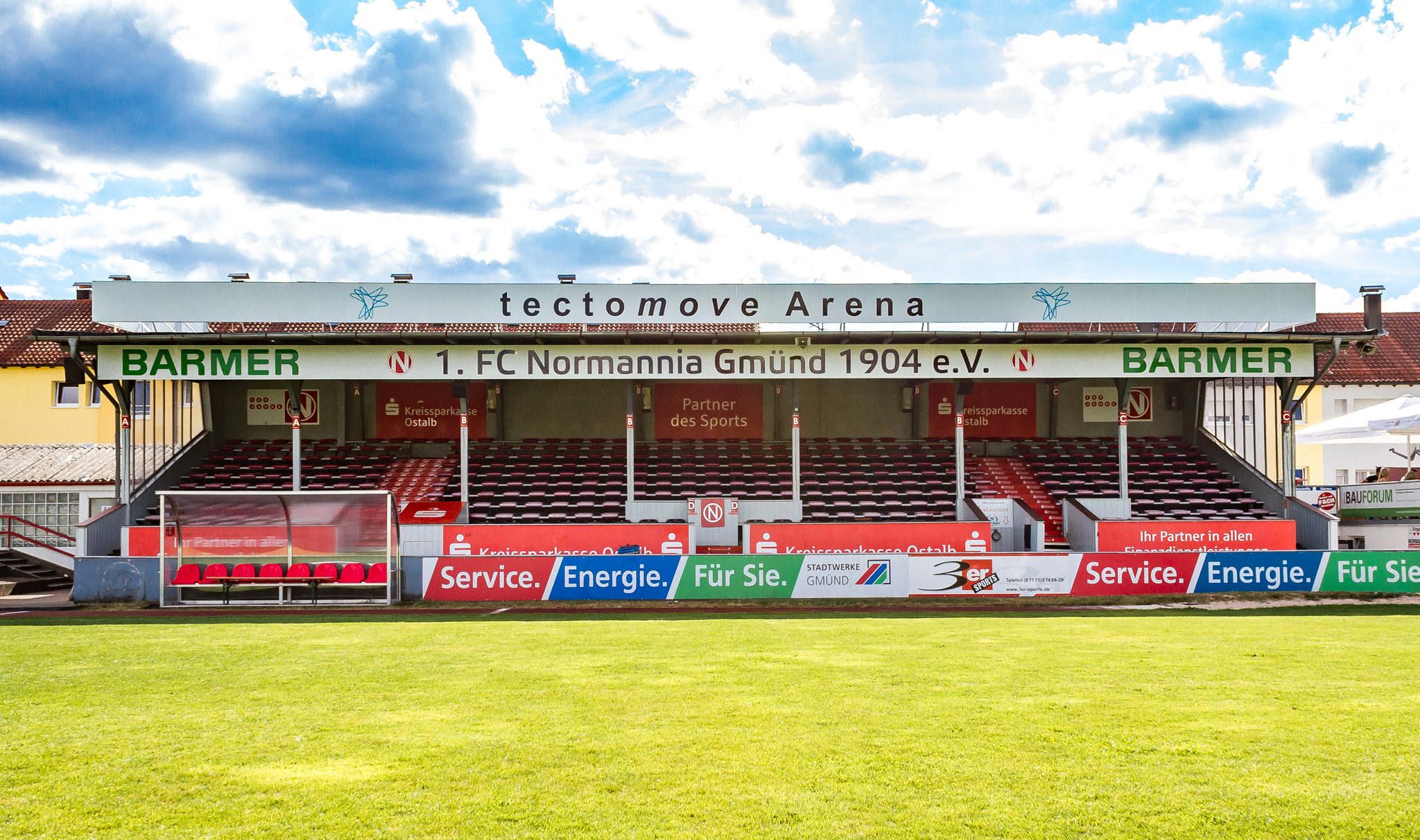 Tribuene-fcn